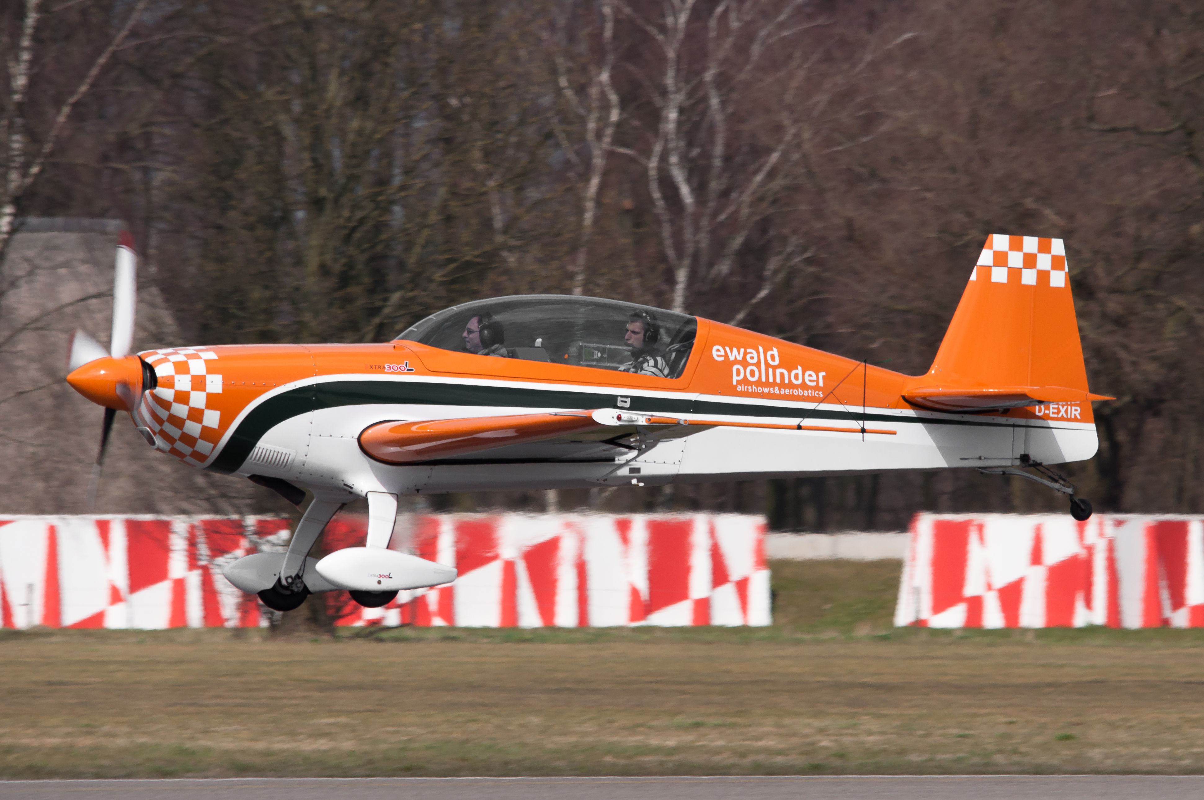 D-EXIR